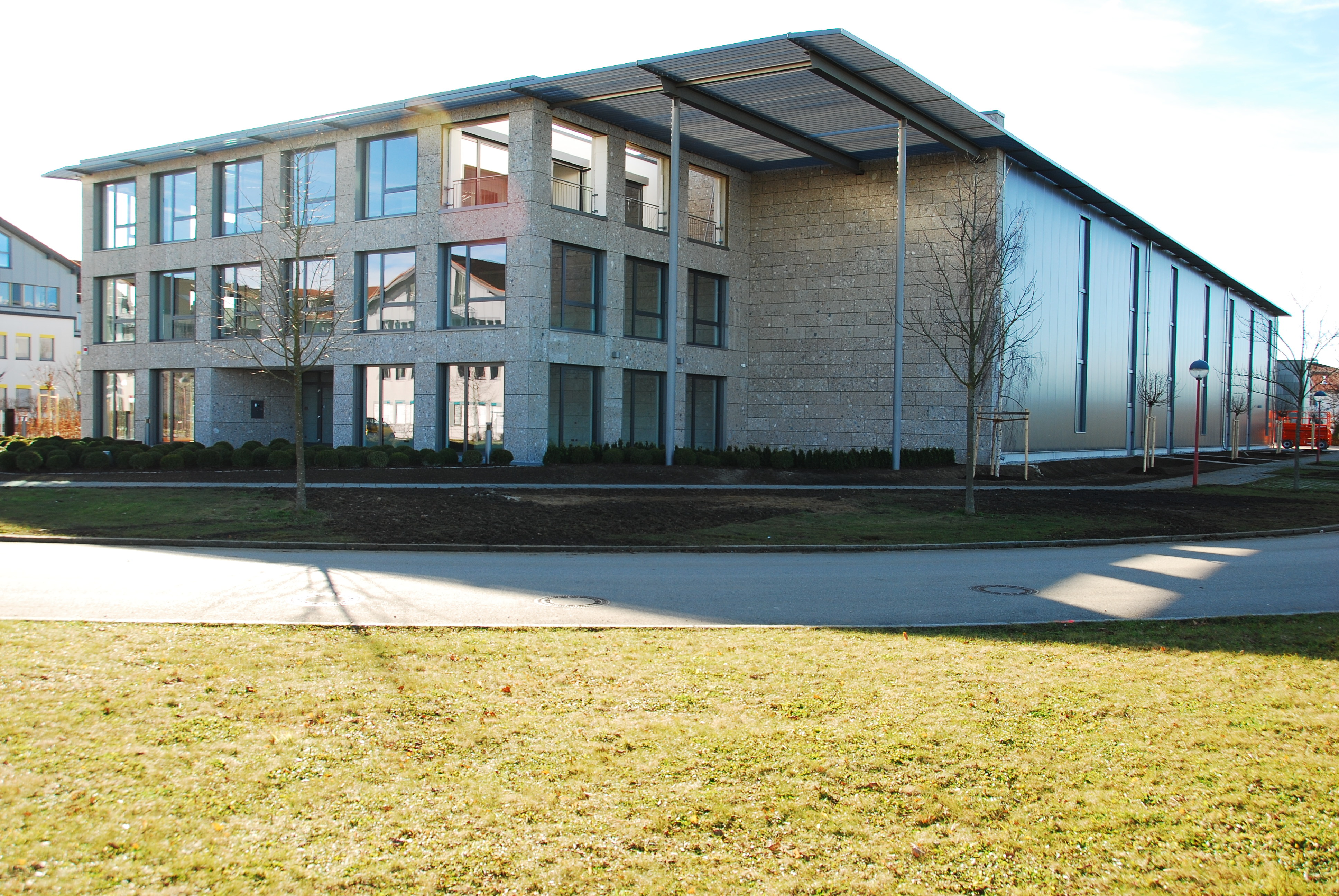 Hauptniederlassung mit Papier-Zentrallager der Fedrigoni Deutschland GmbH. Adresse: Bajuwarenring 10 a, 82041 Oberhaching (südlich von München). Baujahr: Nov. 2010